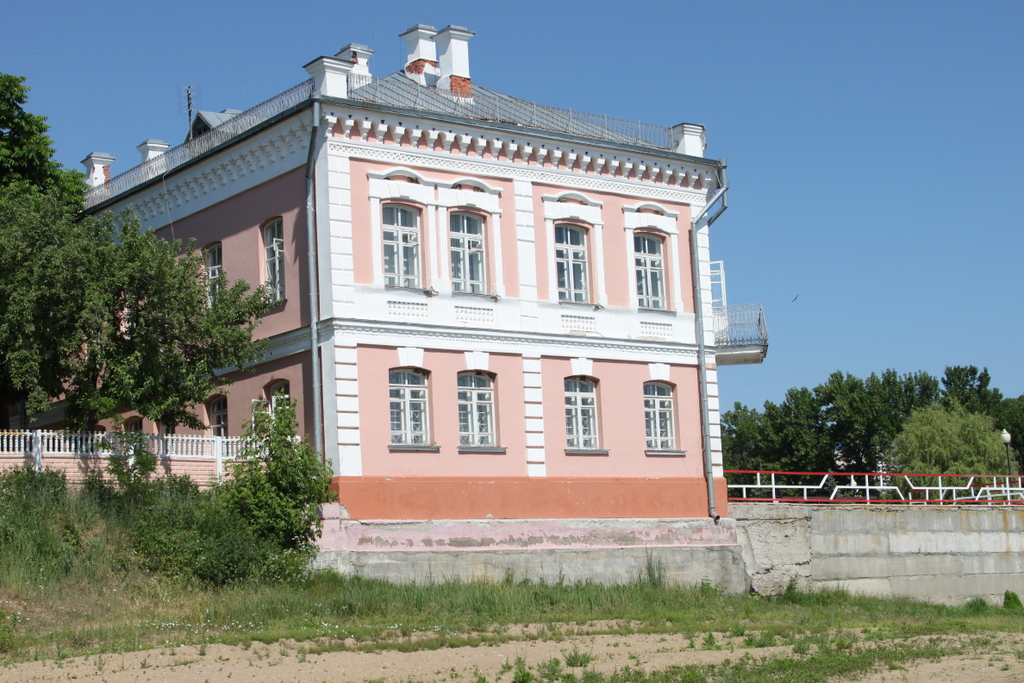 Беларуская (тарашкевіца): Старая камяніца ў мстэчку Лоеў. Жылы будынак 19 стагодзьдзя This is a photo of Belarusian heritage monument. Reference number: 313Г000465 ( WLM)